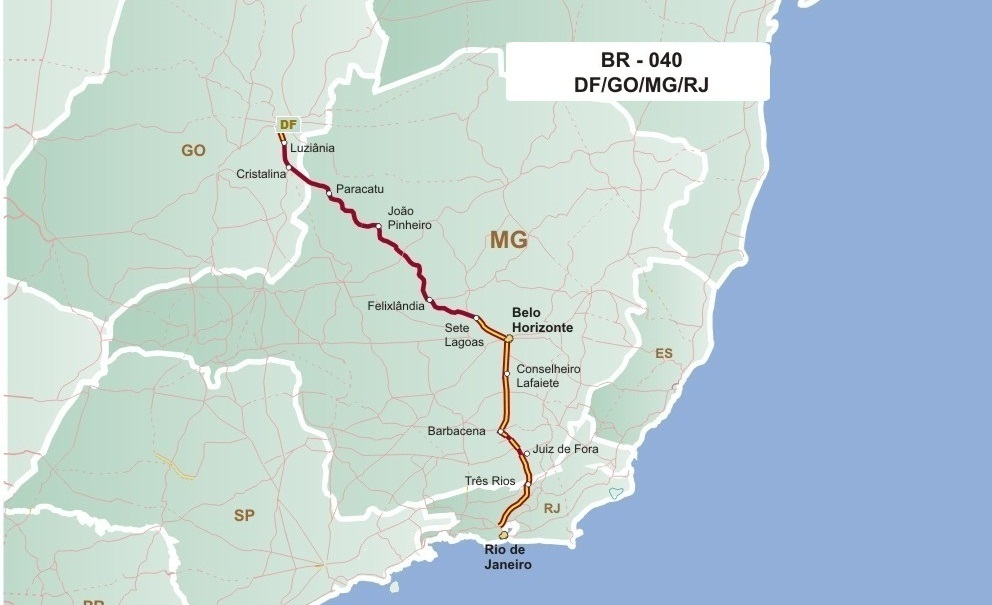 Mapa descritivo da BR-040 em relação as outras rodovias brasileiras.